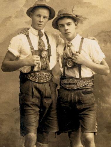 Deux garçons allemands portant une Lederhose traditionnelle dans les années 1890.